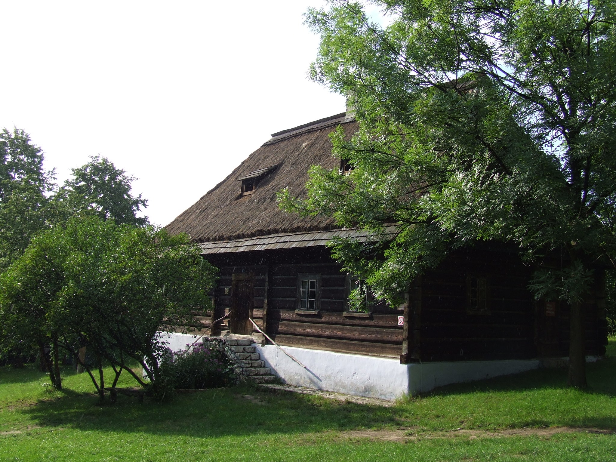 Wygiełzów - skansen, chałupa sołtysa z Przegini Duchownej z 1862 r.